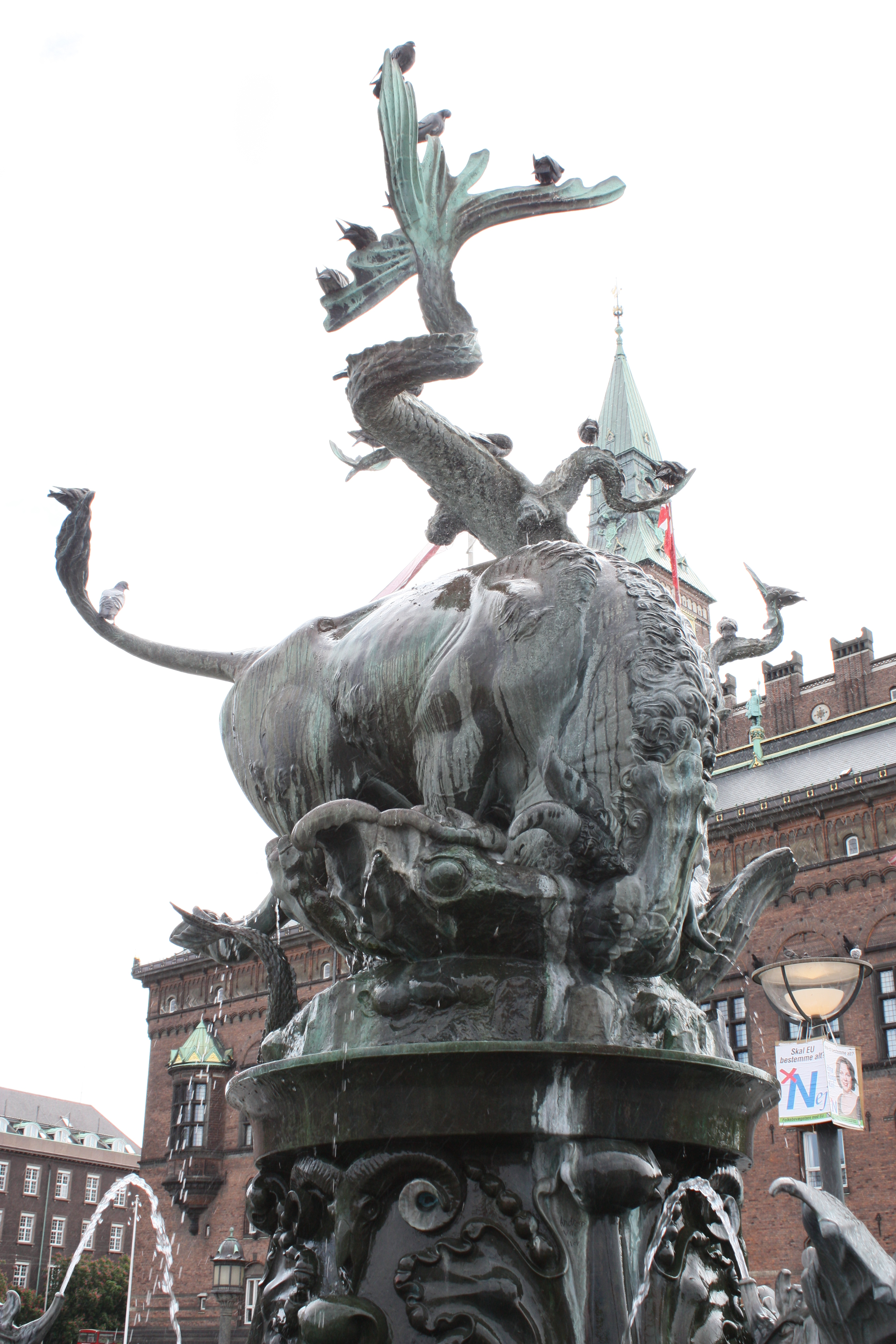 Kopenhagen 2009